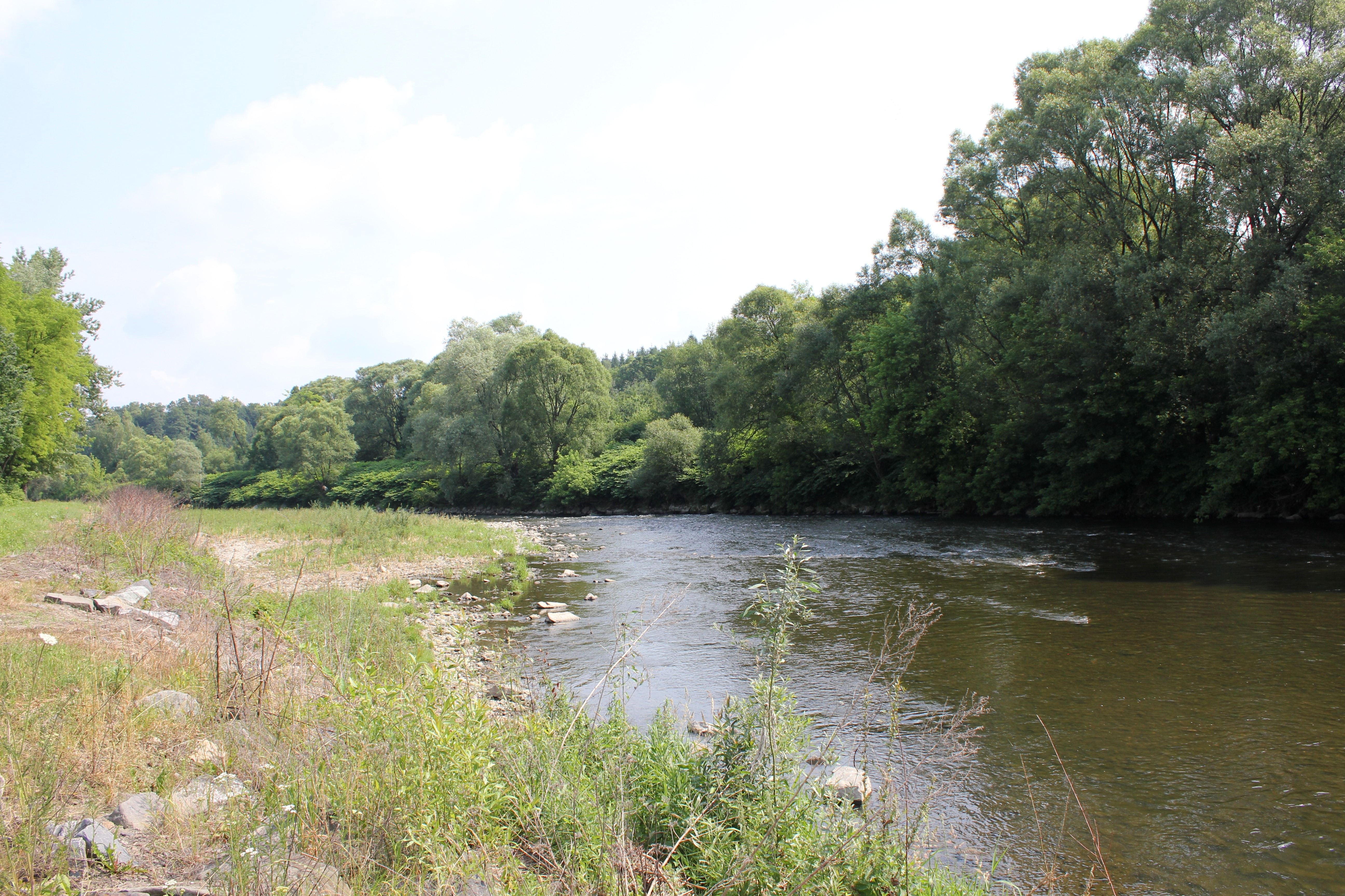 Olše v Karviné-Loukách, pohled směrem po proudu.